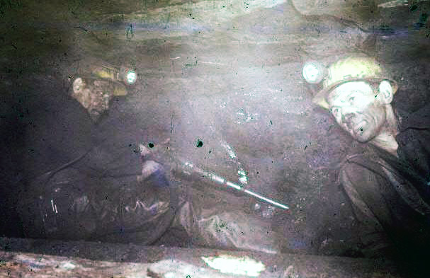 Abbau von Steinkohle in einem niedrigen Flöz der Zeche Alte Haase, Sprockhövel, Deutschland